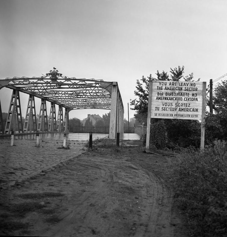 Berlin, an der Zonengrenze, Beschilderung Information added by Wikimedia users.Knesebeckbrücke zwischen Teltower Damm in Berlin und Zehlendorfer Straße in Teltow über den Teltowkanal